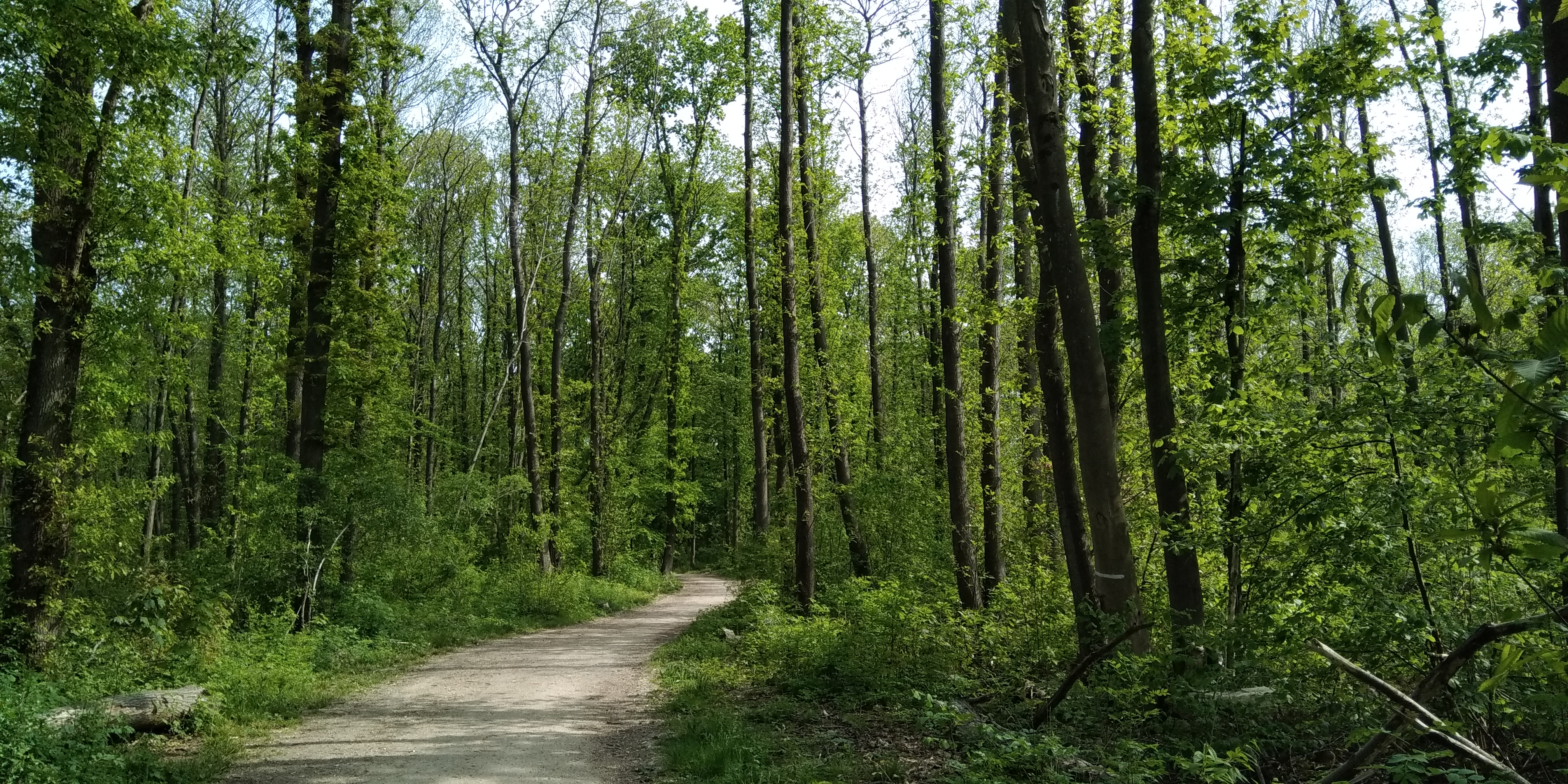 Bois des Rinvals, entre Franconville et Cormeilles en Parisis